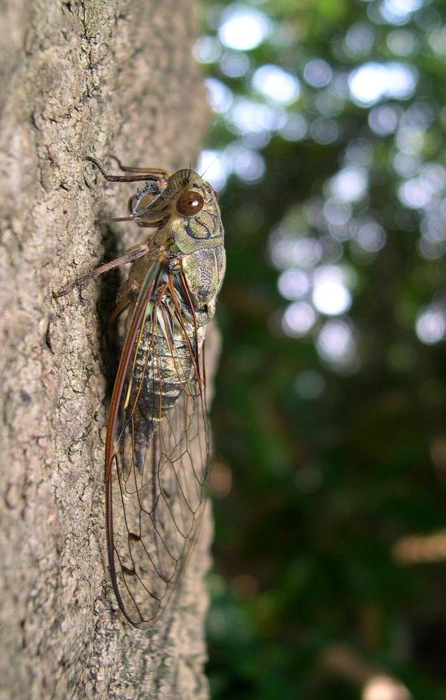 Description: Meimuna opalifera (WALKER,1850), female (Hemiptera, Cicadidae) Loc.: Yokohama, Kanagawa, Japan. Date: 2005-09-11 Photo: User:Takahashi ja: ツクツクボウシ（雌）(カメムシ目セミ科）神奈川県横浜市にて撮影